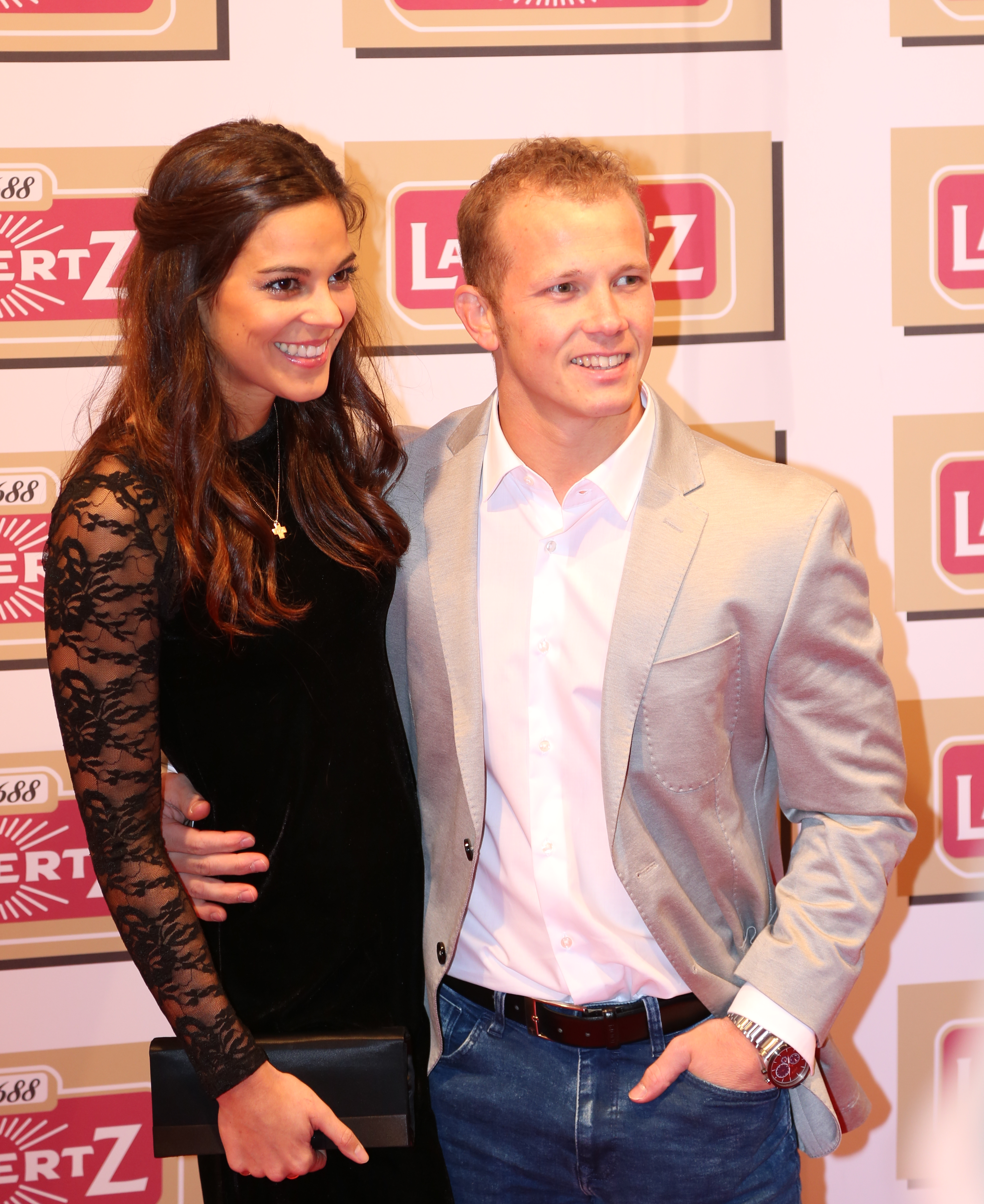 Fabian Hambüchen und seine Freundin Marcia Ev bei der Lambertz Monday Night 2017.